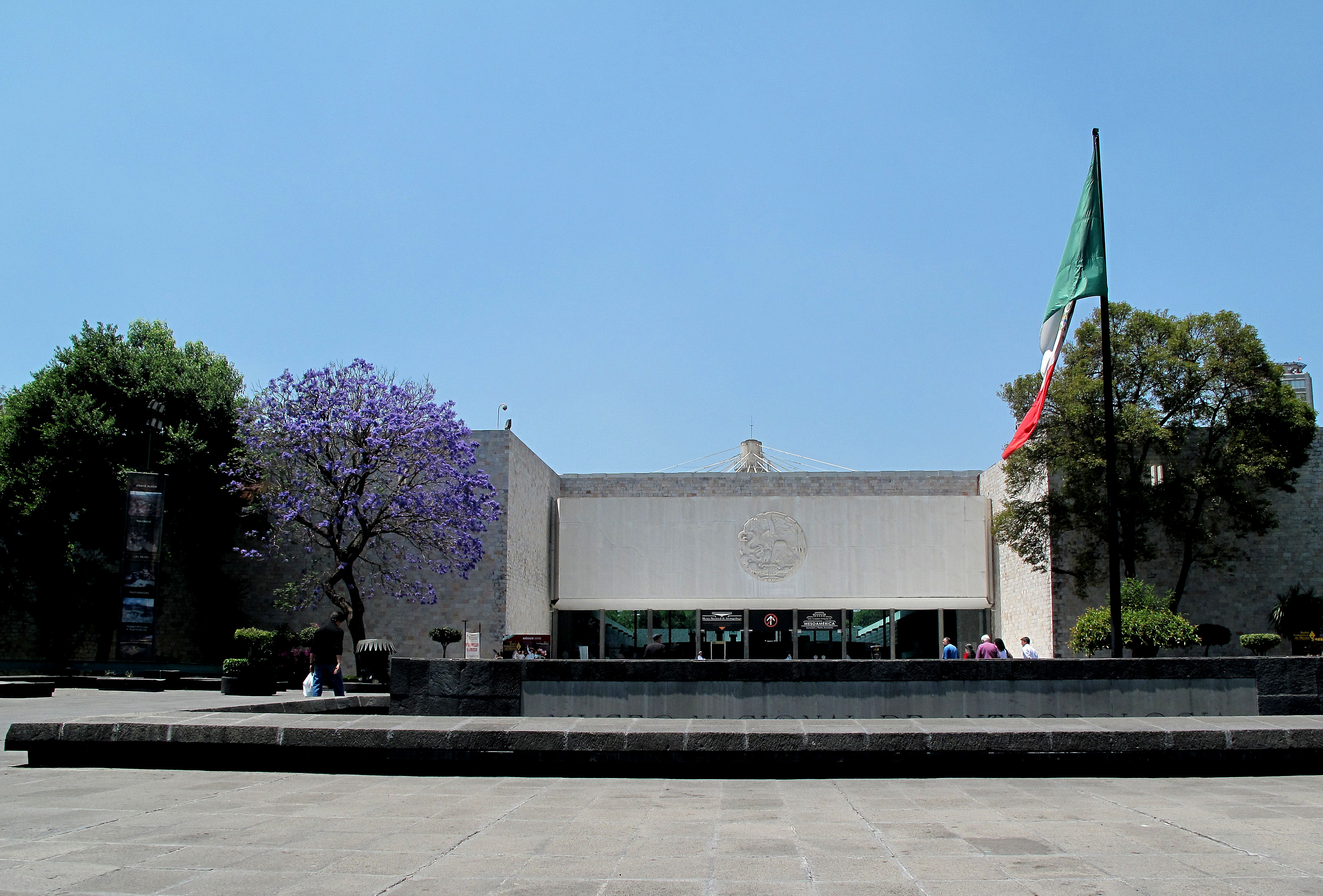 Museo Nacional de Antropologia